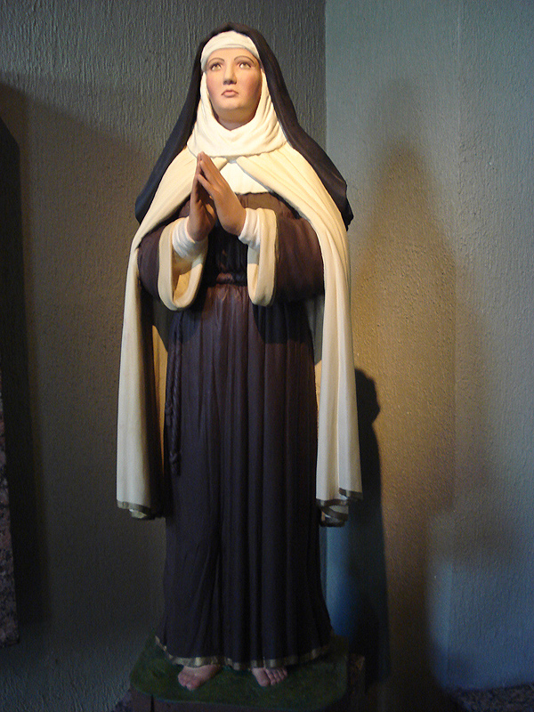 Pietro Stangherlin: Santa Teresa de Ávila, na Capela do Santíssimo da Catedral de Caxias do Sul, Brasil.